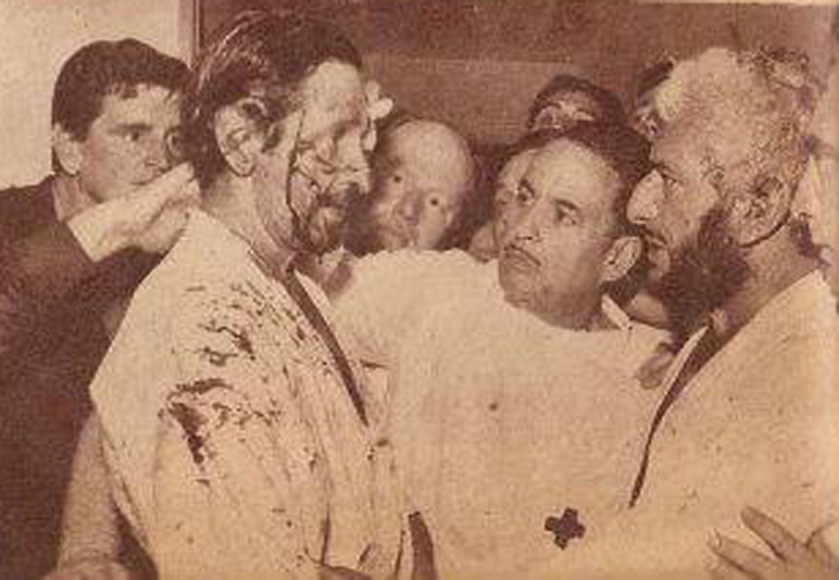 El luchador argentino Martín Karadagián junto al conde don Jaime de Mora y Aragón.